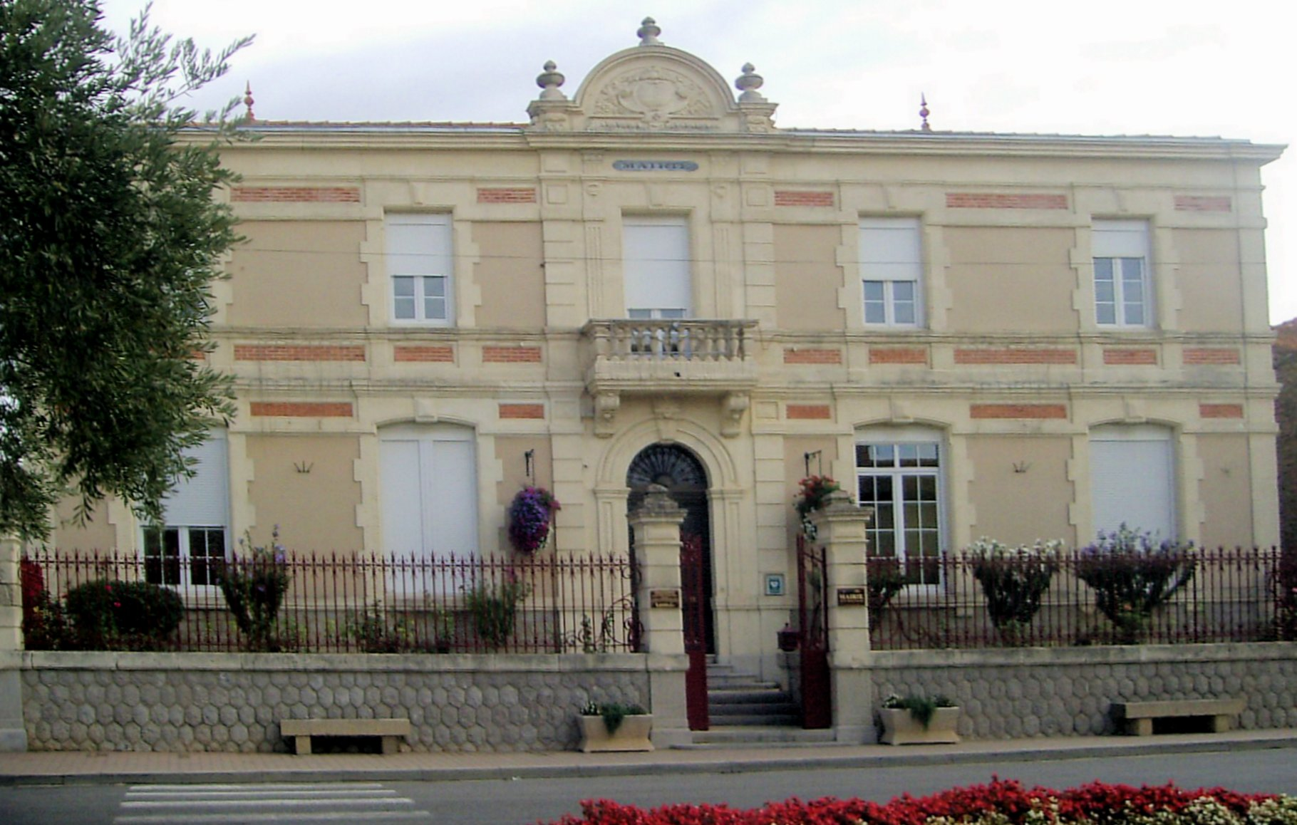 La mairie de Vinassan